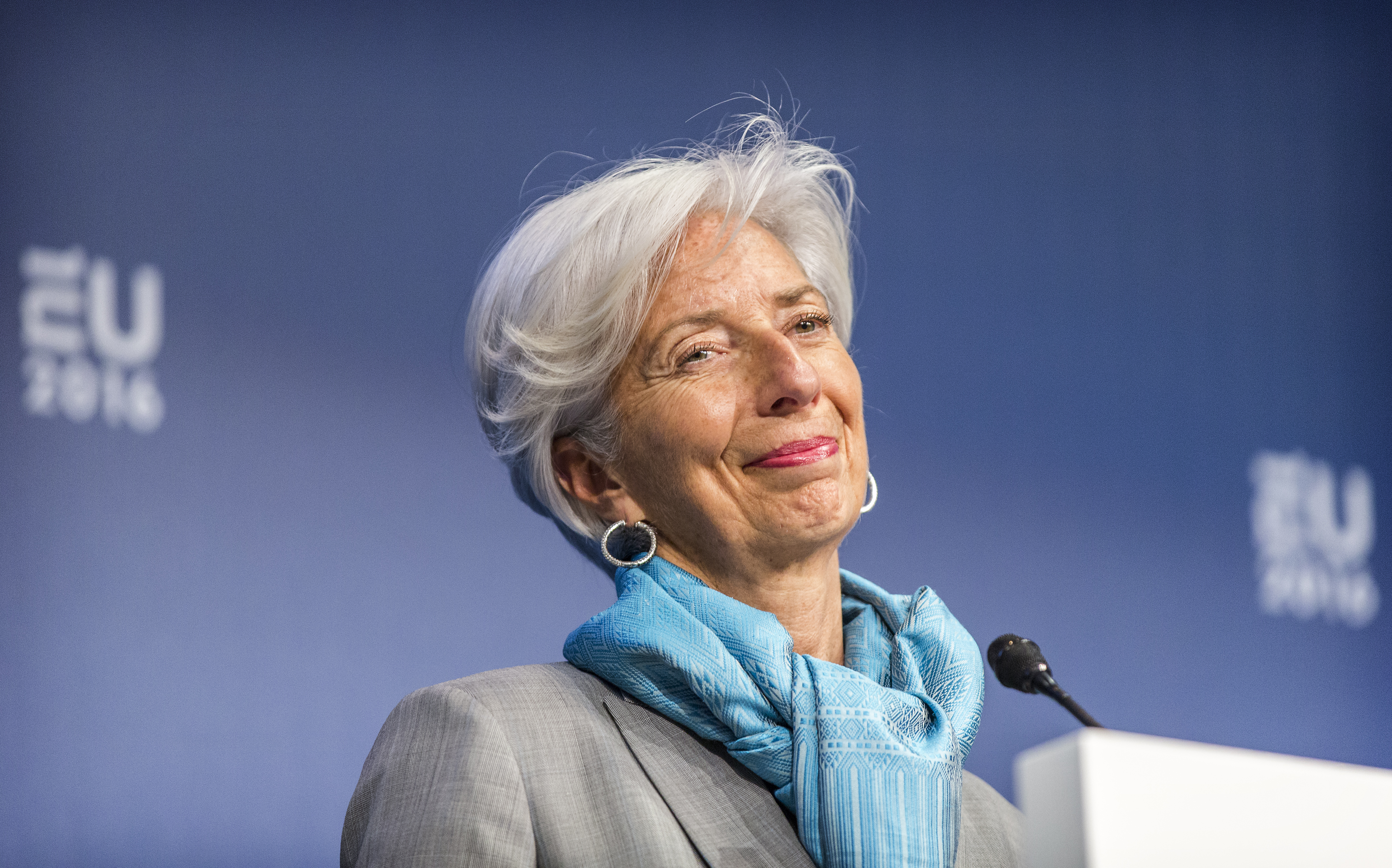 Amsterdam, 22 april 2016 / Amsterdam, 22nd of April 2016. Informele bijeenkomst van ministers van Financiën. Informal Meeting of EU Finance Ministers. Minister van Financien Jeroen Dijsselbloem, staatssecretaris Eric Wiebes. Foto: Rijksoverheid/Valerie Kuypers – Photograph: Dutch Government/Valerie Kuypers